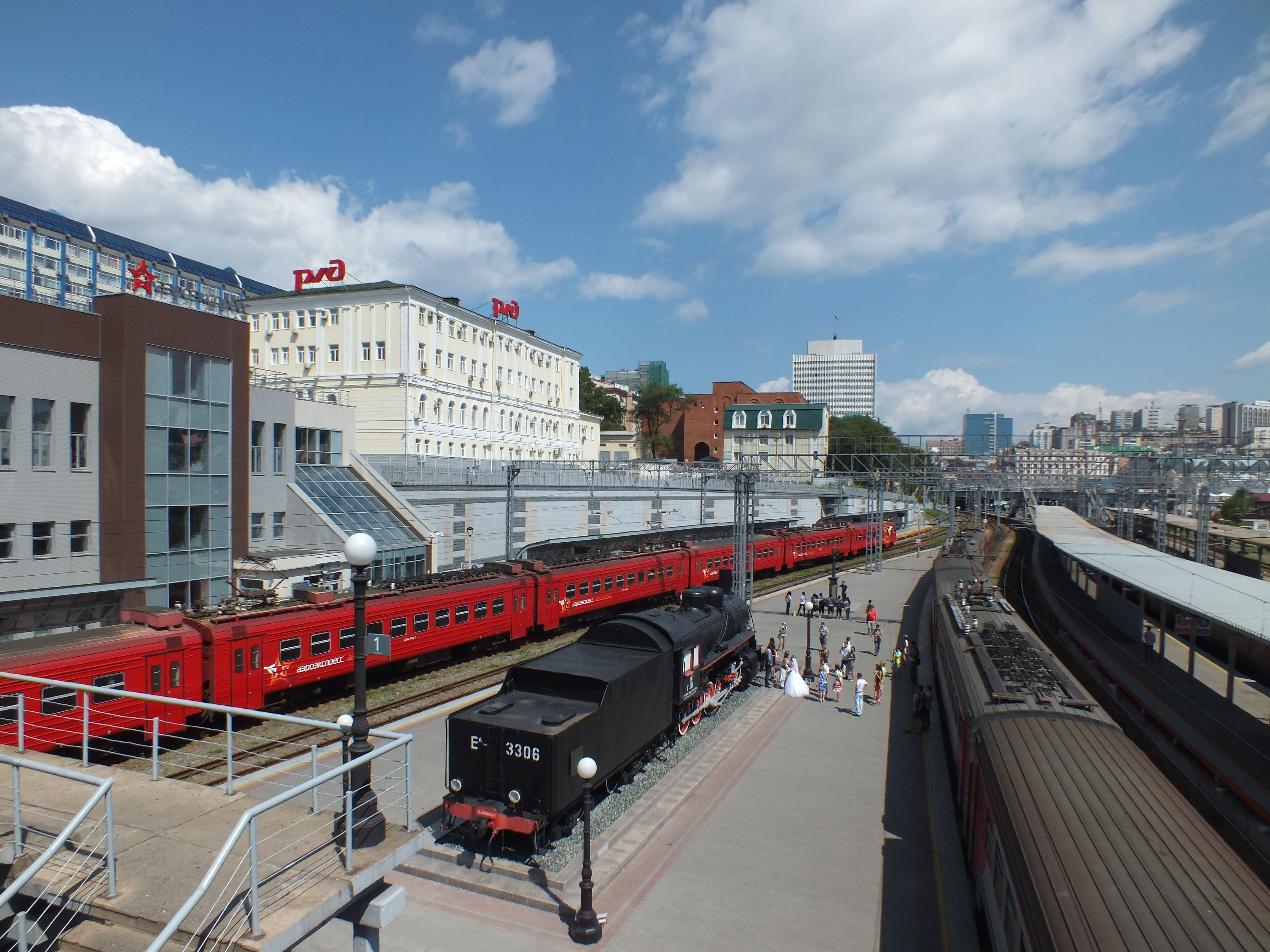 Электричка ЭД9М и паровоз Еа Владивосток